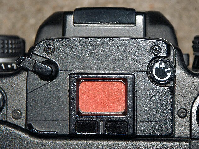 Minolta Dynax 9 - Okularverschluss am Sucher (Fotografiert mit: Minolta Dimage 7 Hi)